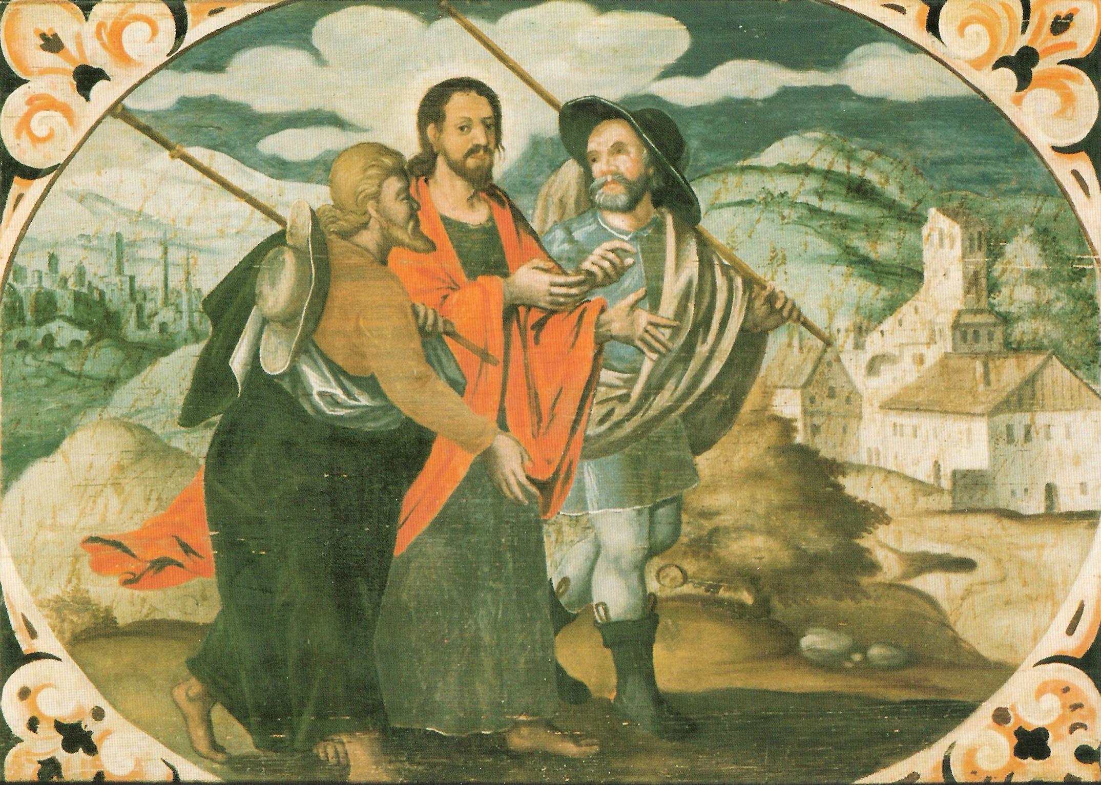 Apostel bei Emaus